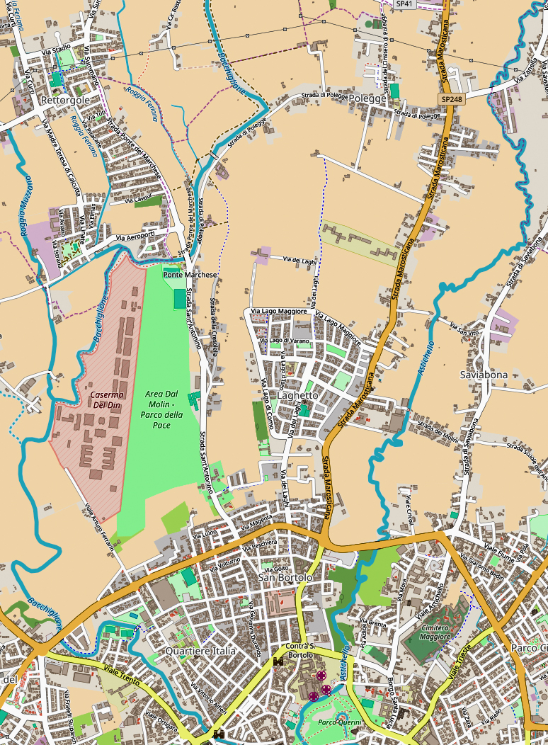 mappa Circoscrizione 5